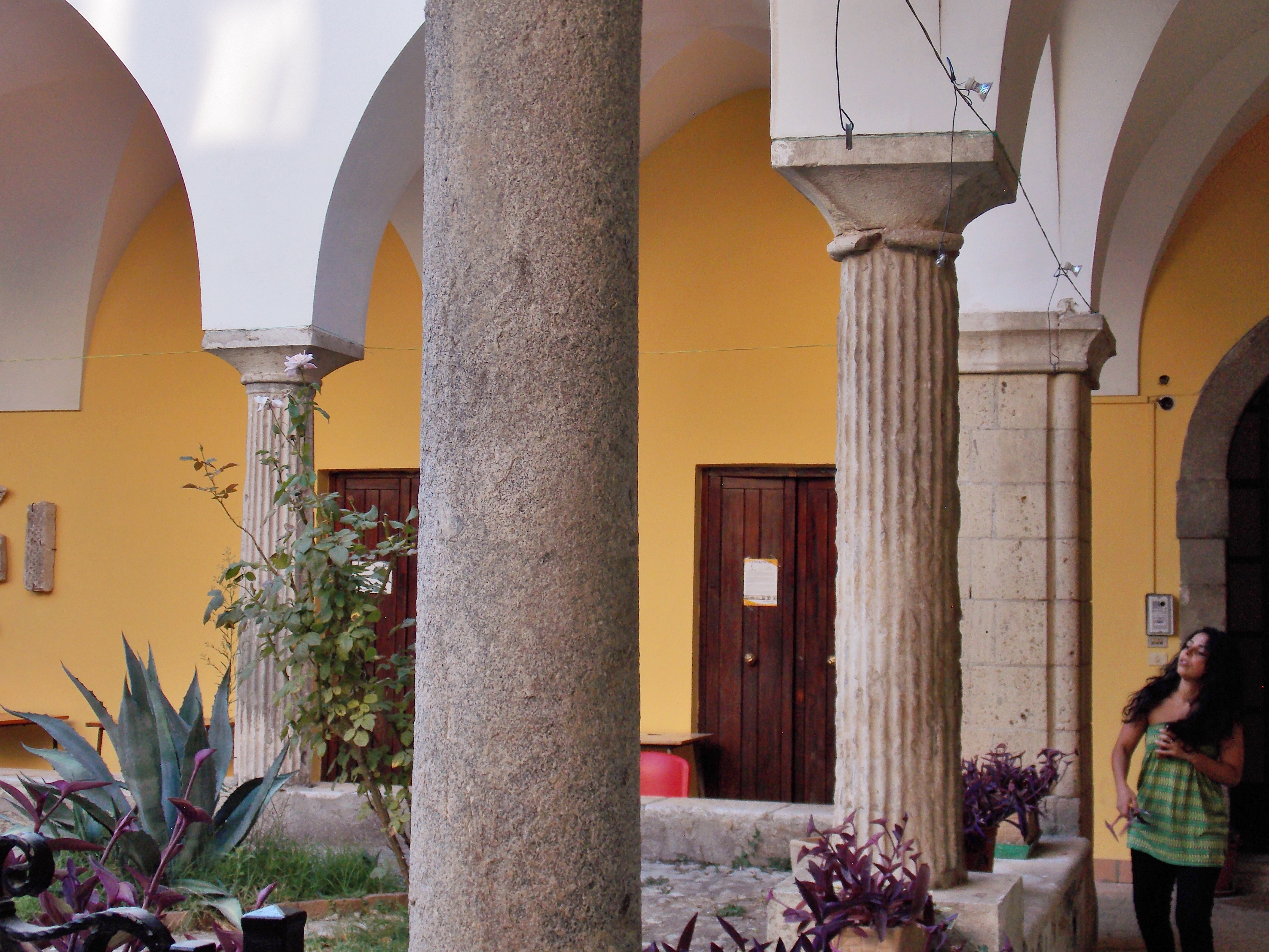 Convento di San Francesco di Benevento. Chiostro grande